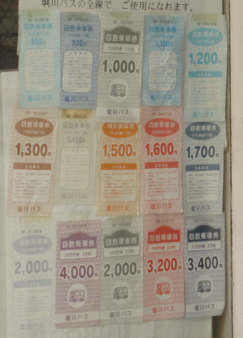 西鉄柳川駅の堀川バス定期発行所に貼られている回数券の見本。